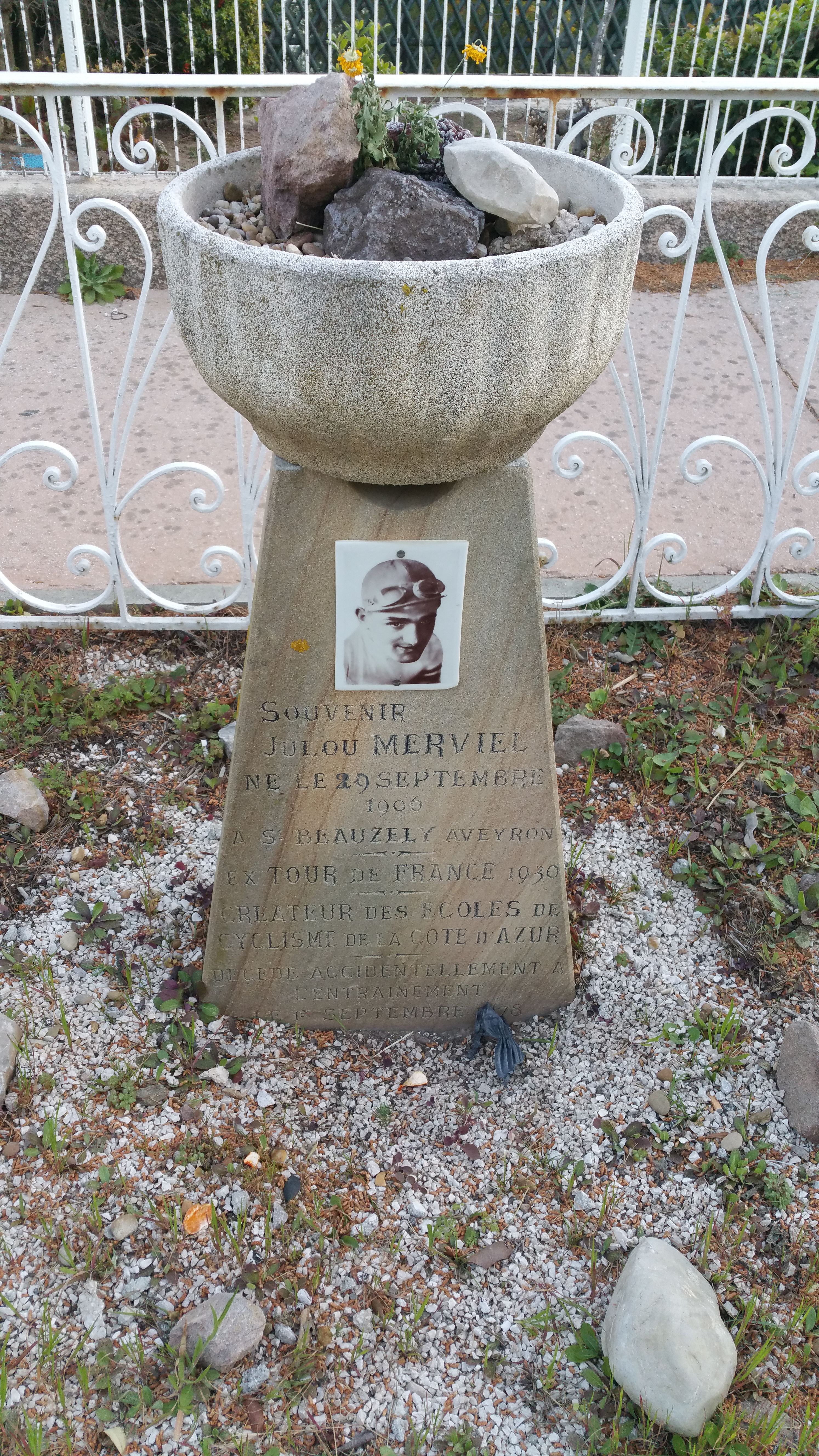 Monument en mémoire du cycliste Jules ("Julou") Merviel (1906-1978) à Carqueiranne (Var) où il est mort accidentellement lors d'un entrainement de vélo. Le monument est situé au bord de la piste cyclable du Littoral qui relie Toulon à Hyères.